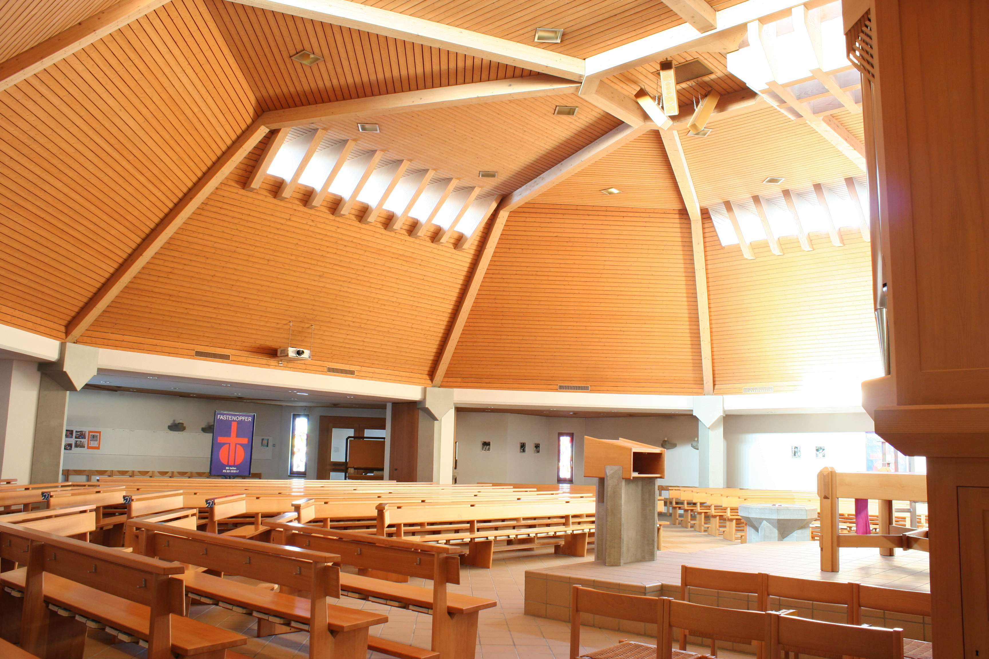 Römisch-katholische Pfarrkirche St. Martin Illnau-Effretikon, Innenansicht